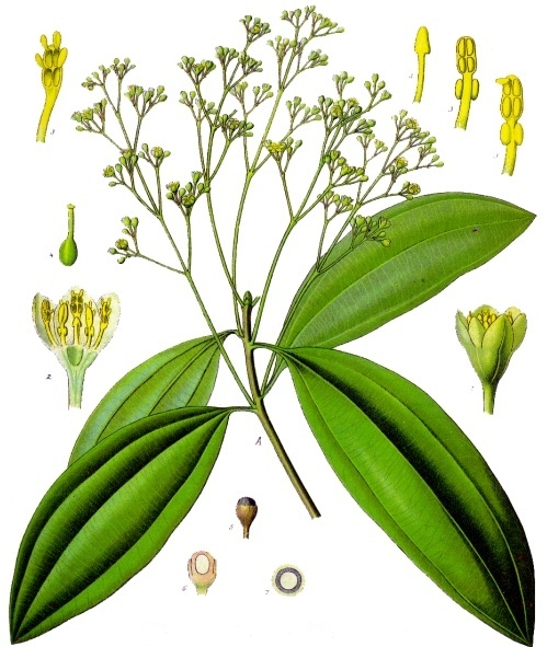 Zimtkassie. A blühender Zweig in natürl. Grösse; 1 Blüthe, vergrössert; 2 dieselbe im Längsschnitt, desgl.; 3 Staubgefäss, desgl.; 4 Stempel, desgl.; 5 Frucht, desgl.; 6 dieselbe im Längsschnitt, desgl.; 7 dieselbe im Querschnitt, desgl.